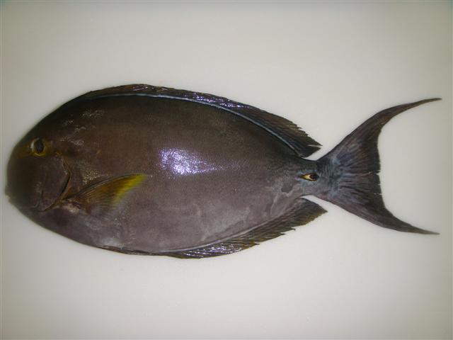 A. mata recolectado en Tuticorian, Tamil nadu, India.